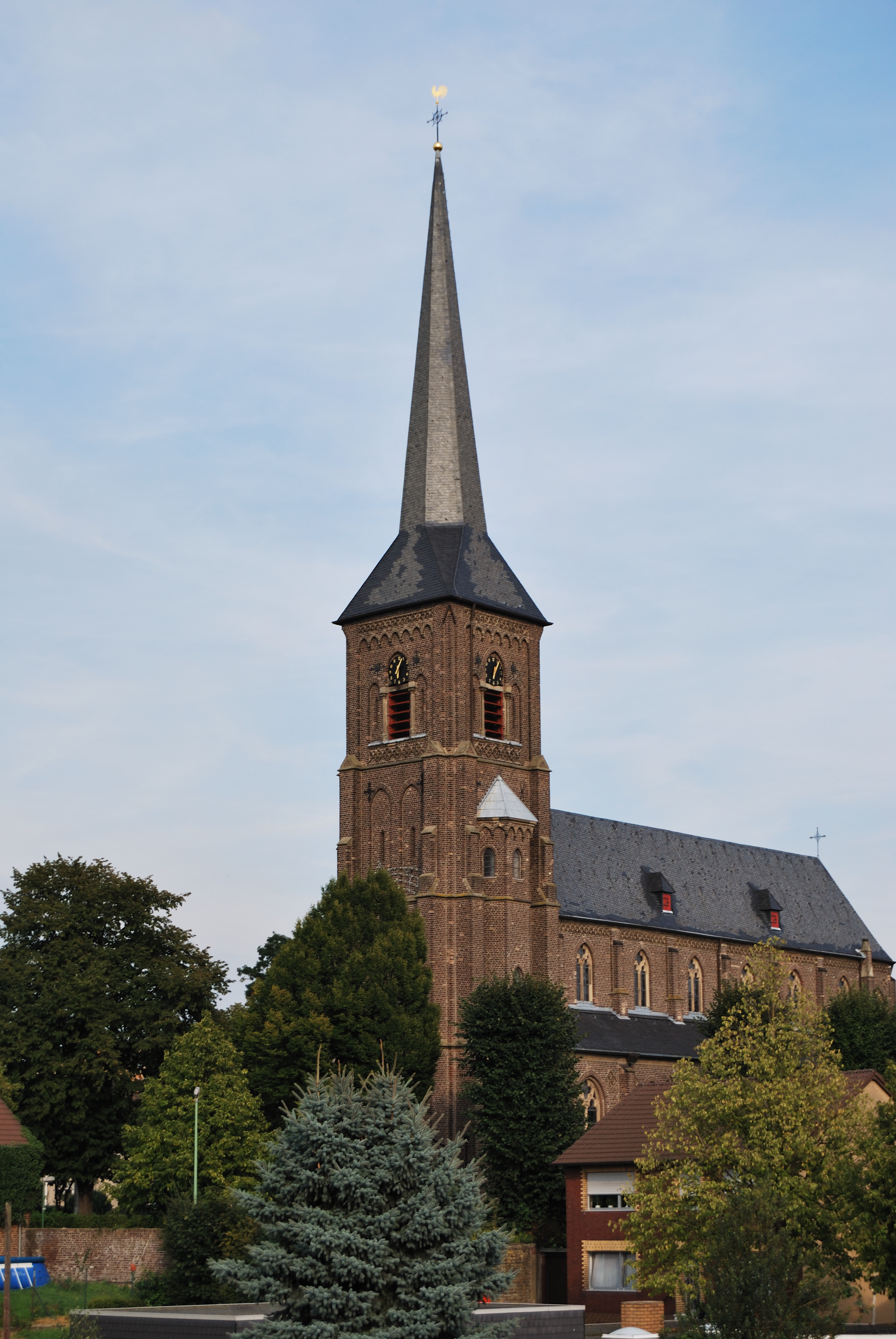 römisch-katholische Pfarrkirche St. Vinzentius in Oberaußem, Rheinland; erbaut 1878-1881 nach Entwurf von August Lange (Köln); unter Denkmalschutz